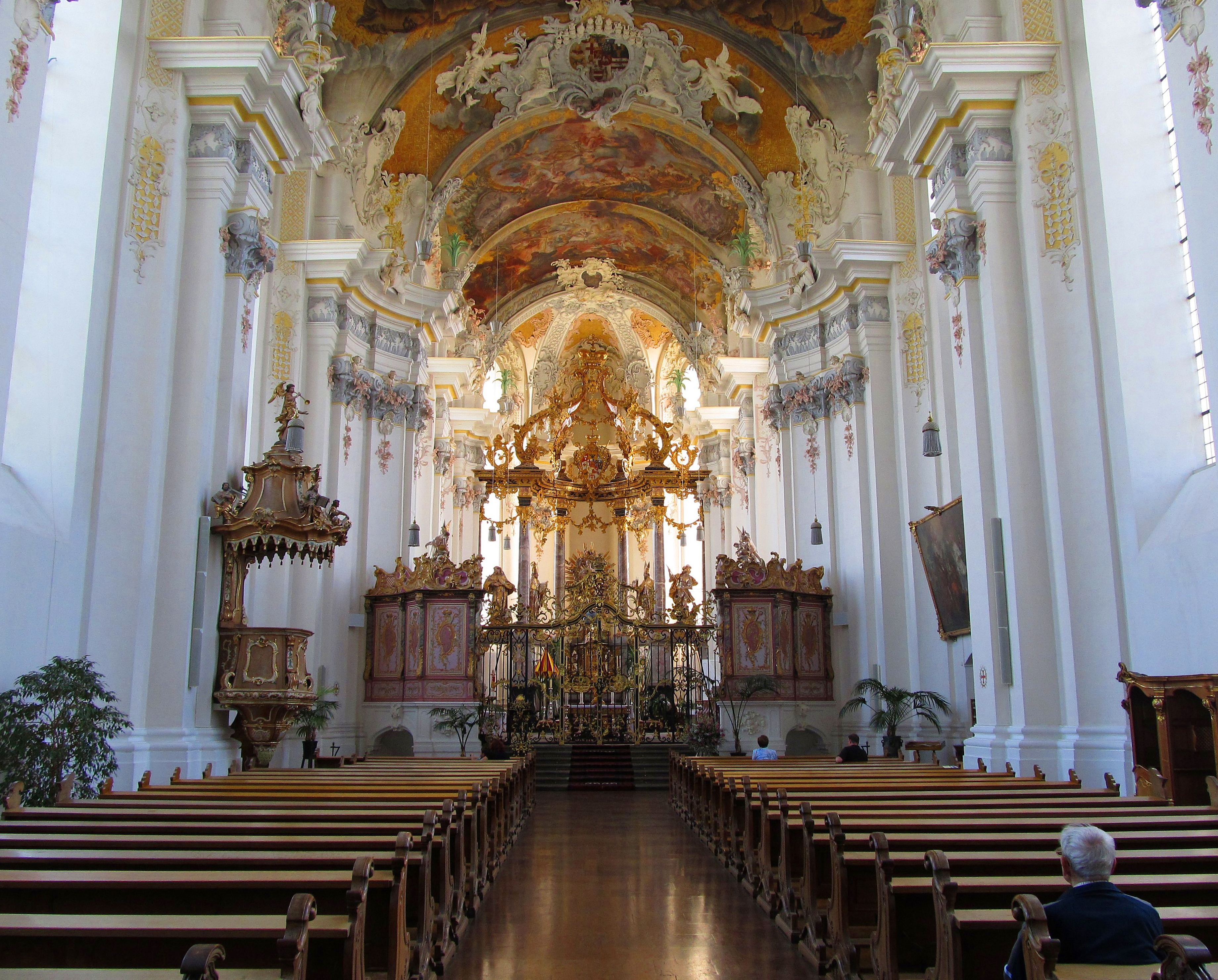 Blick ins Innere der katholischen Pfarrkirche St. Paulin in Trier, Rheinland-Pfalz